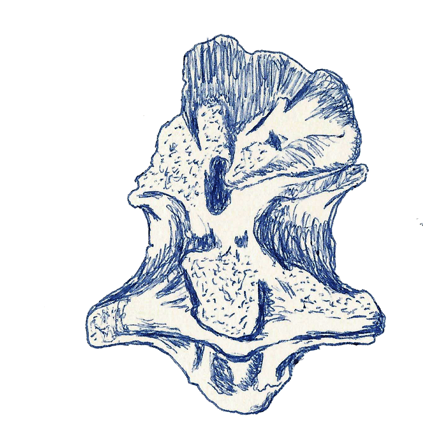 Illustration of a fossil of Indosaurus